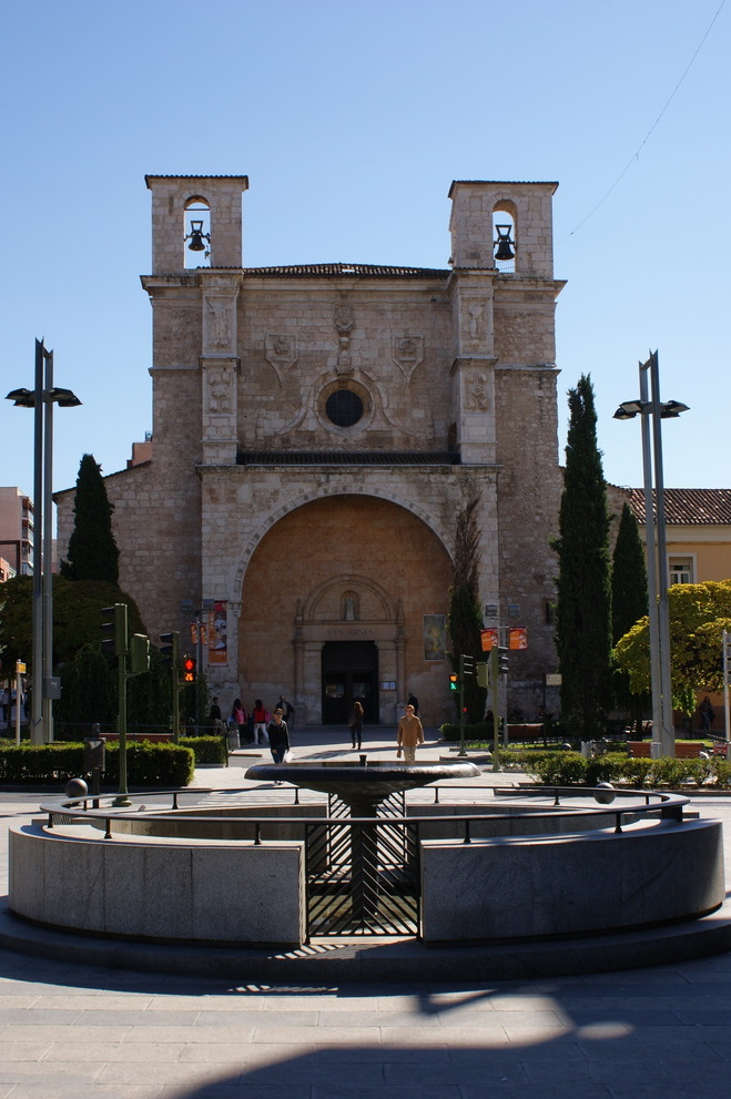 La iglesia actual fue, antaño, la del convento de Santo Domingo de la Cruz, ya desaparecido. Su construcción comenzó en 1561.